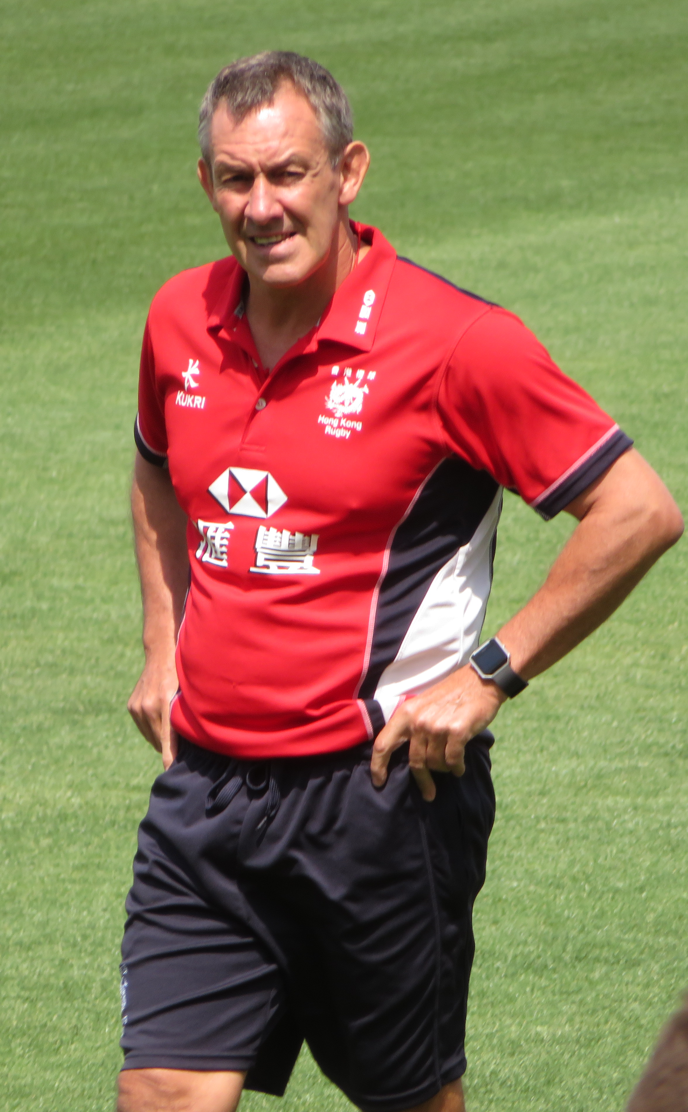 リー・ジョーンズヘッドコーチ（2017年アジアラグビーチャンピオンシップにて）